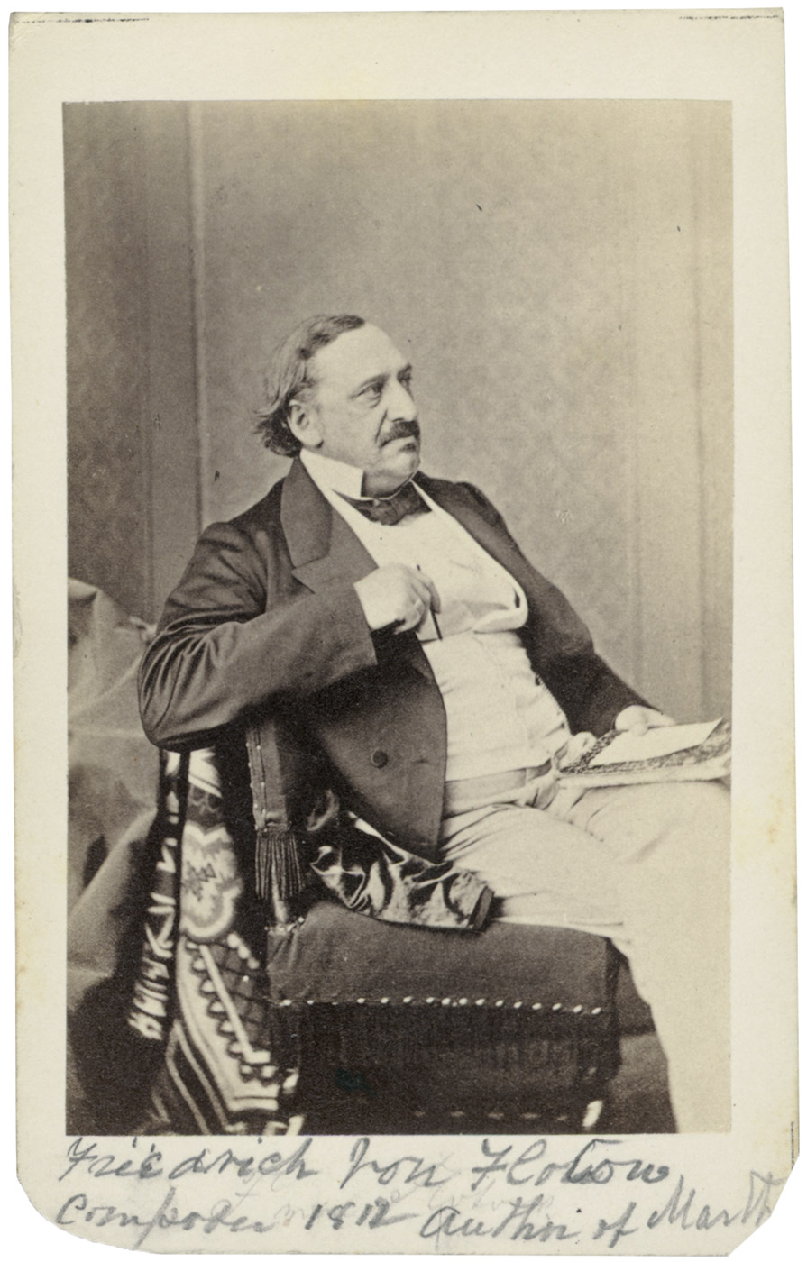 Friedrich von Flotow. Albumen carte-de-visite print. Circa 10,5 x 6,5 cm.